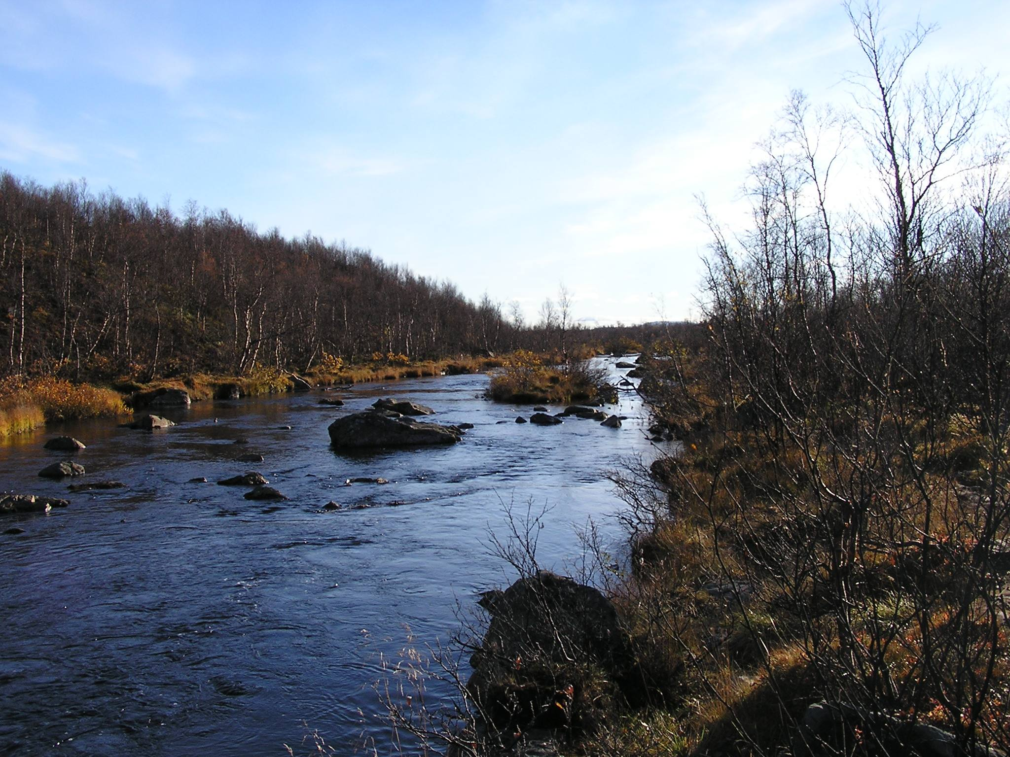 Намайоки